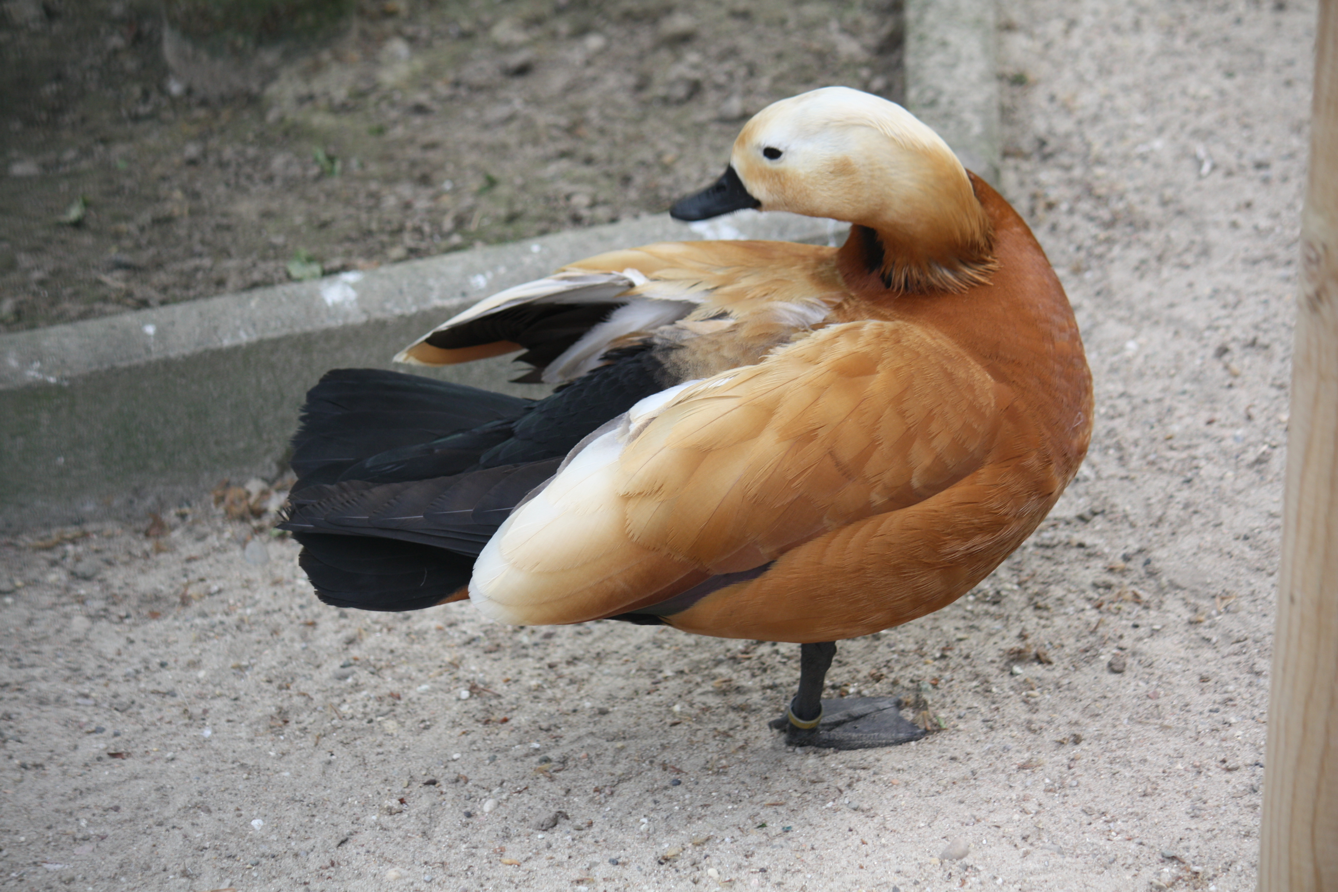 Rostgans in der Orangerie, Straßburg